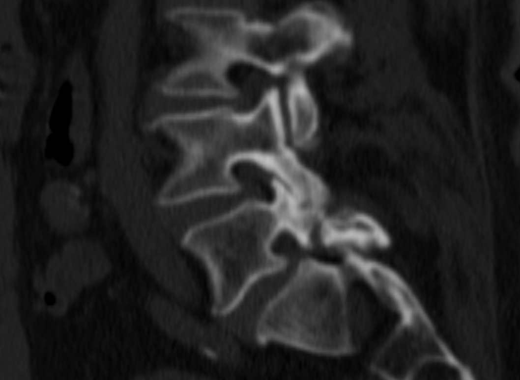 Spondylolyse in der Computertomographie sagittal L5/S1.